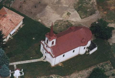 Szent Mihály és Gábor főangyalok templom (Pocsaji Görögkatolikus templom), 1743 - Pocsaj, Hungary, aerialphotography